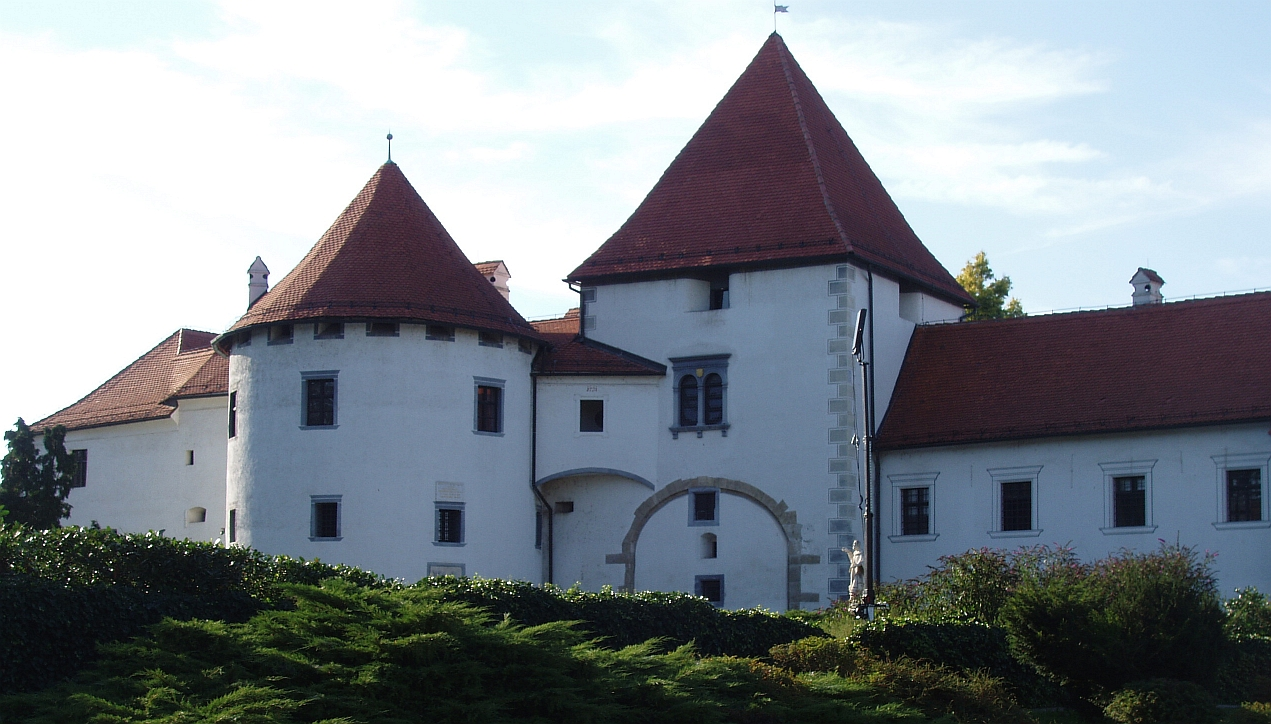 Budova hradu ve Varaždinu, Chorvatsko